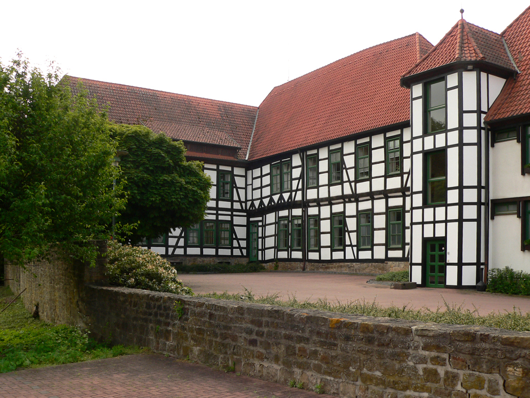 Innenhof des Rathaus von Rehburg-Loccum in Rehburg, früher Burghof der Zweiflügelanlage, der rechte Turm ist ein historisierender Erweiterungsbau aus den 1980er Jahren